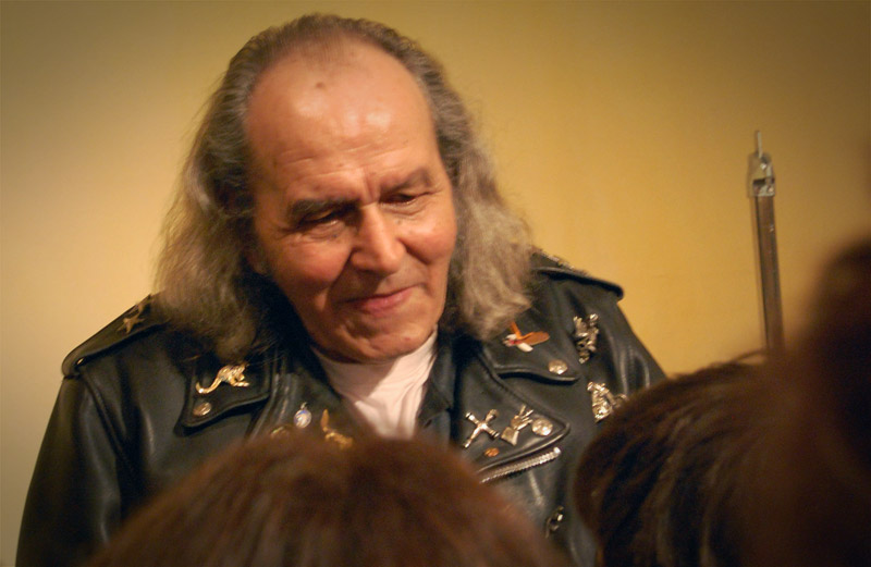 Conférence de Guy Gilbert à l'abbaye de Brogne (Namur, Belgique).